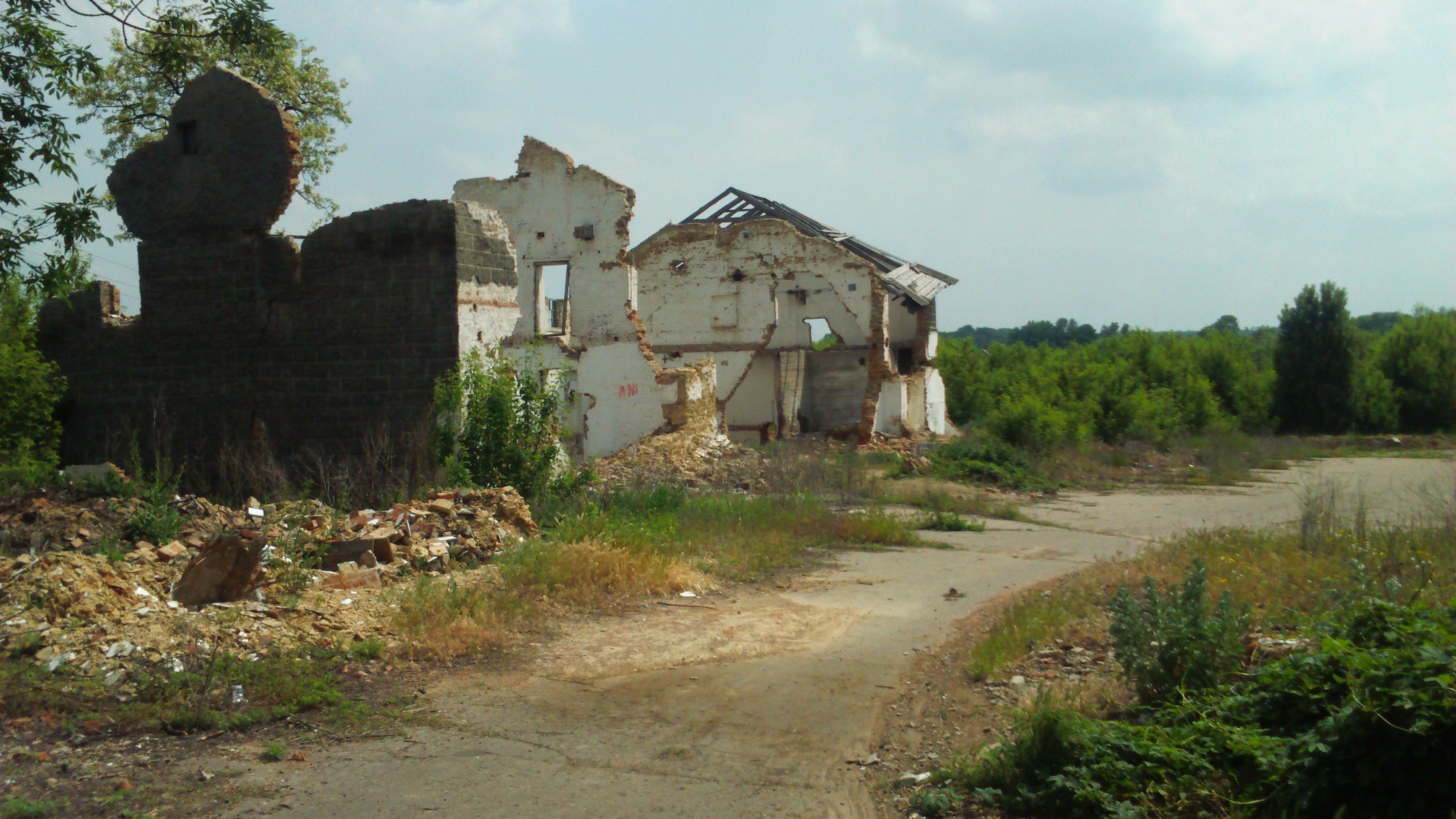 Руїни млина Святогорівка Добропільський район.